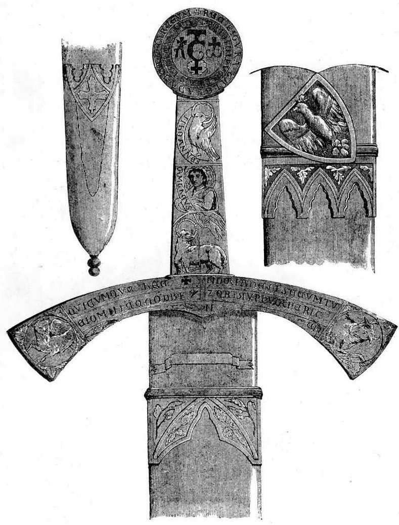 Ilustracja Encyklopedii staropolskiej T.4 316 - Rękojeść Szczerbca